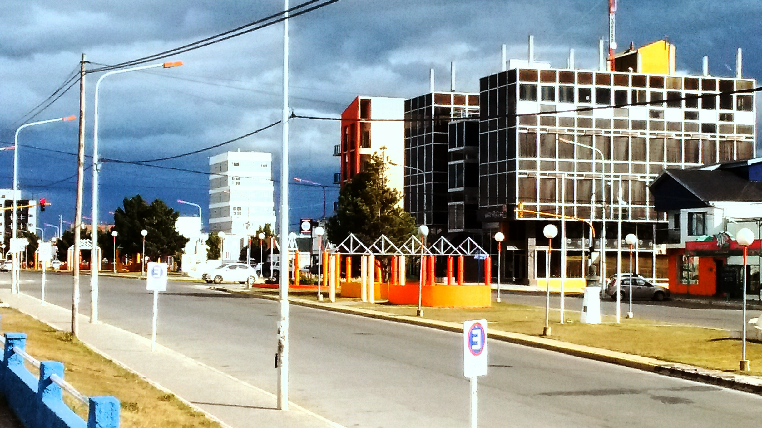 Sector de la ciudad con abundantes edificaciones bajas